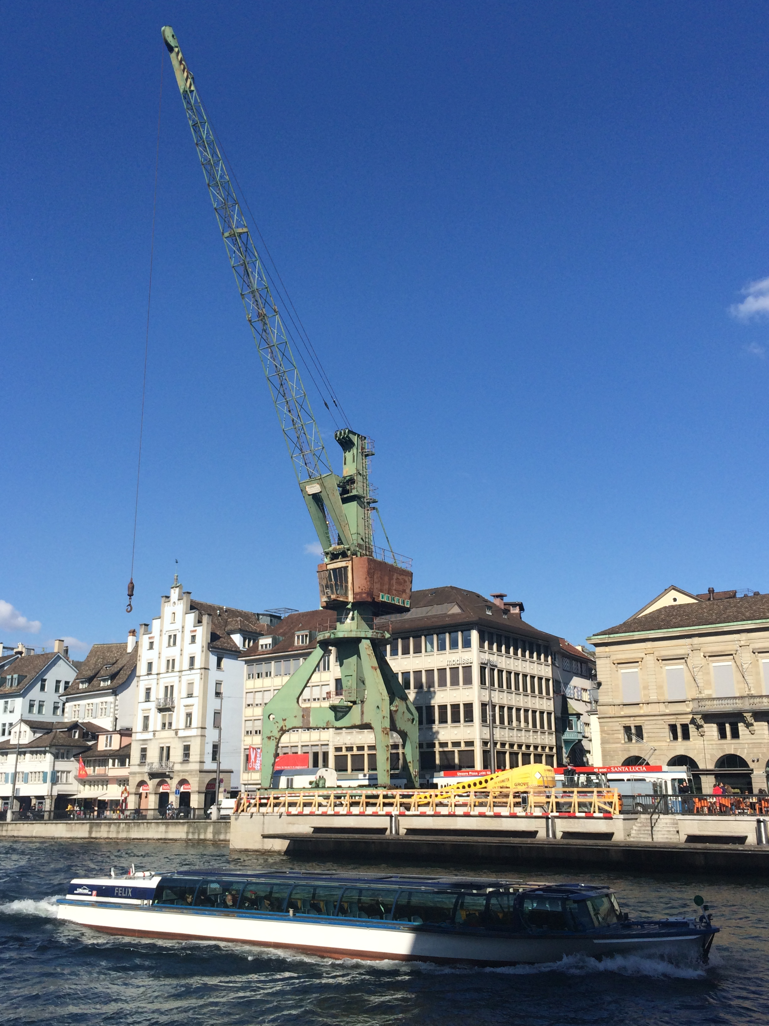 Hafenkran (Kunstprojekt) an der Limmat in Zürich kurz vor Ende der Bauphase